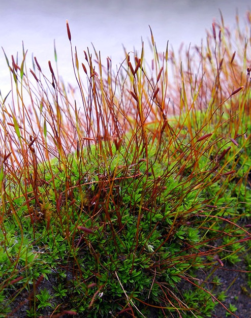 Tortula muralis mit etlichen gestielten Sporenkapseln